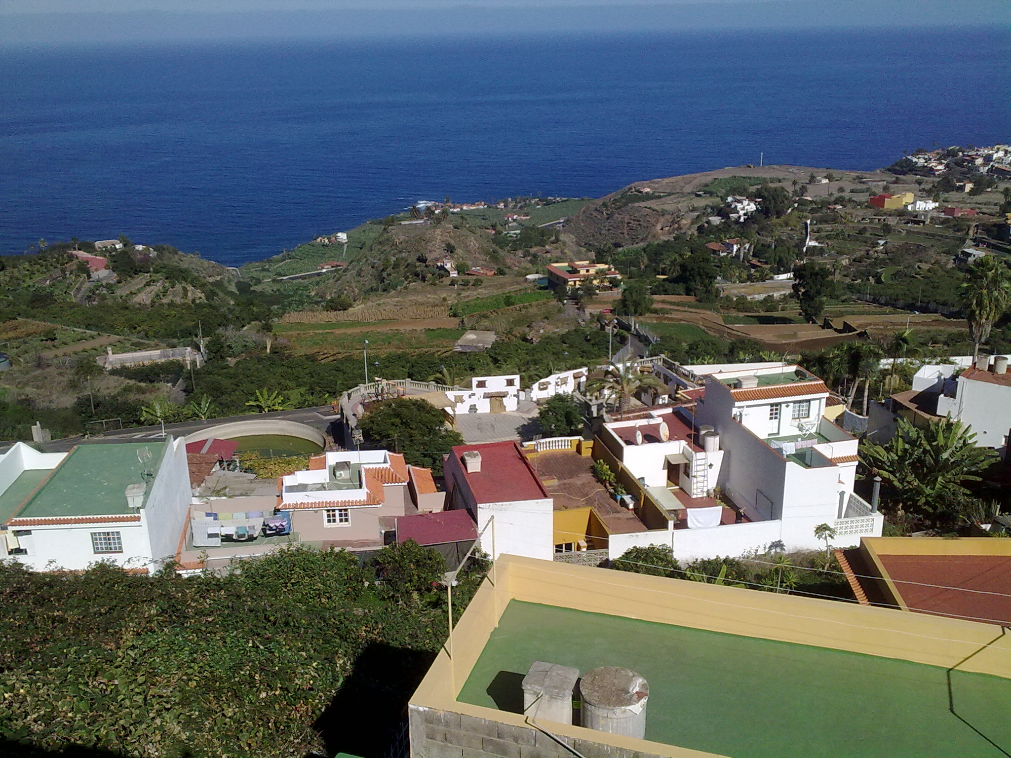 Al fondo la plaza de Tigaiga con Partes del Portal Viviente montadas para la escena final.